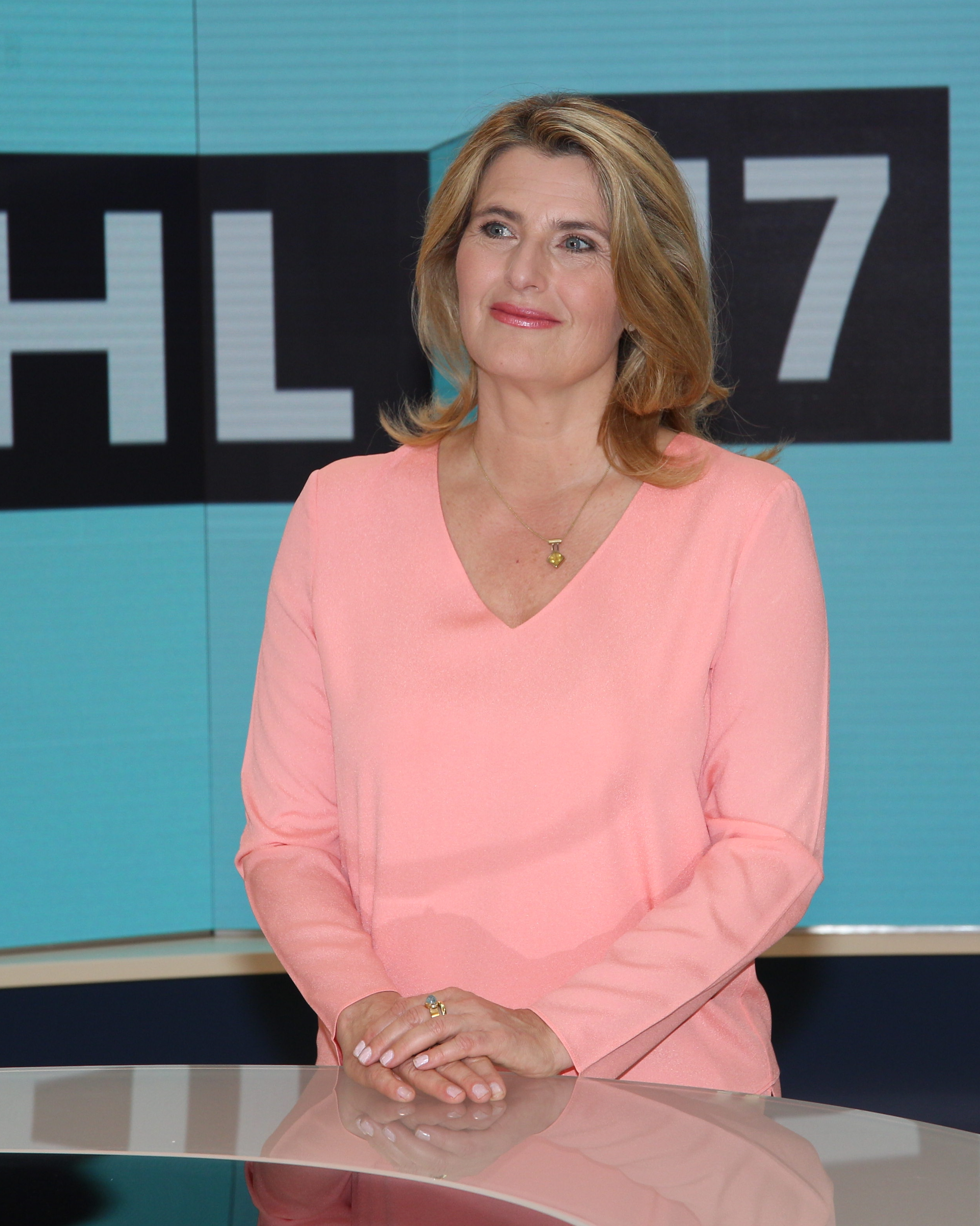 Tina Hassel im ARD-Wahlstudio beim Fototermin zur ARD-Wahlsendung im ARD-Hauptstadtstudio